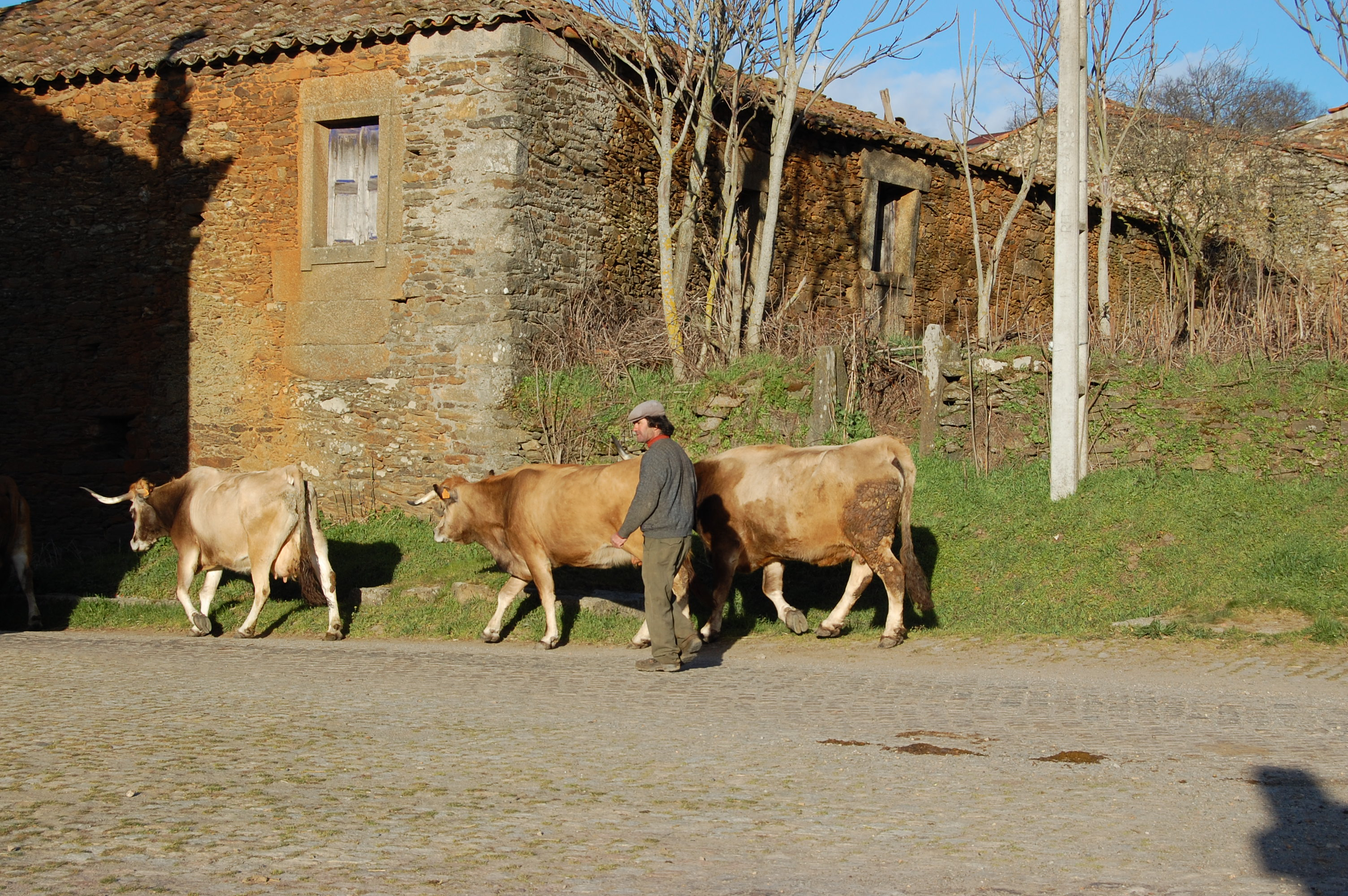 A aldeira de Angueira, concelho de Vimioso, no nordeste de Portugal.